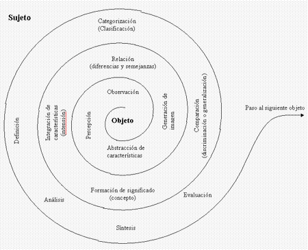 Círculo